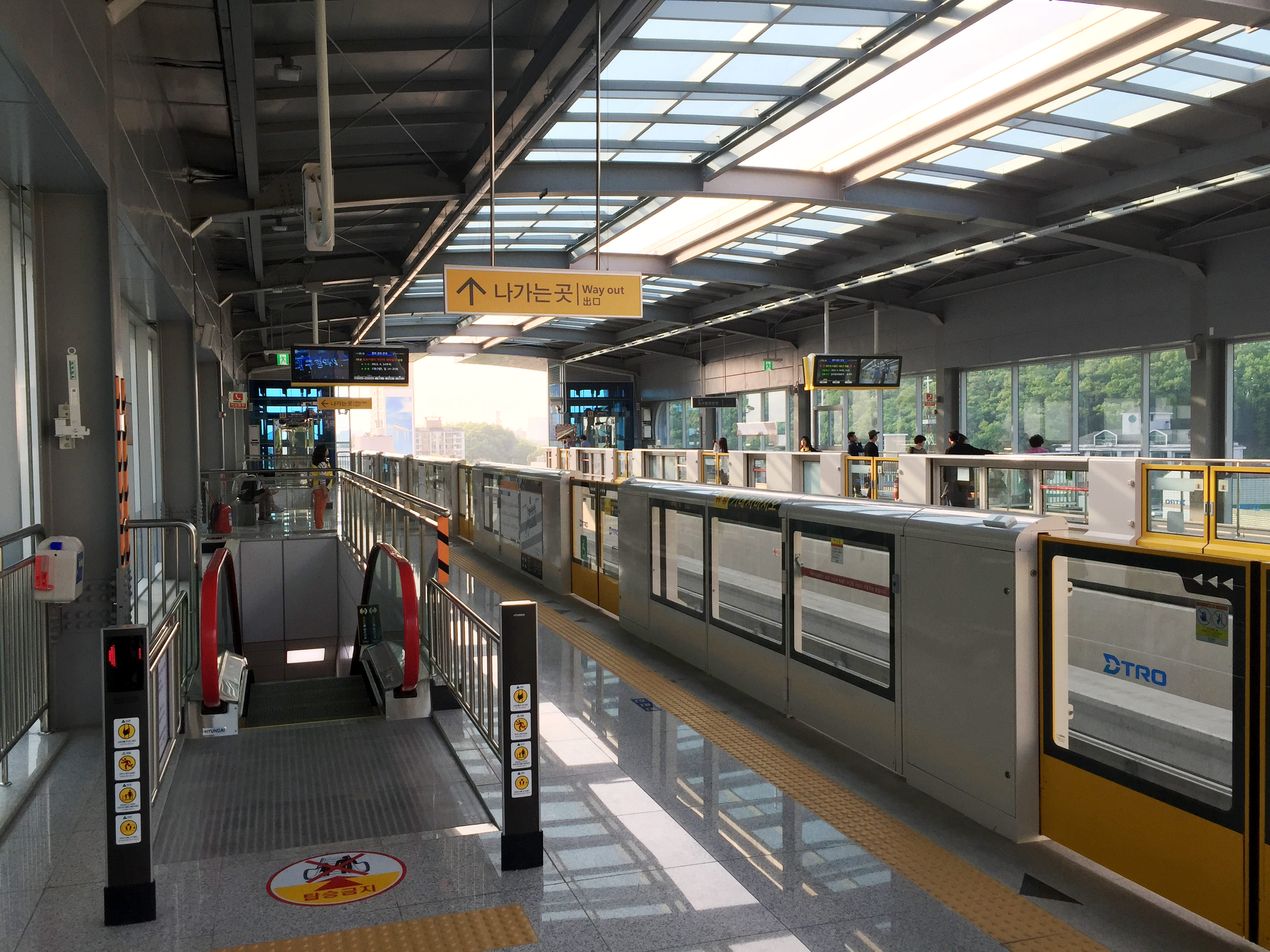 지산역 승강장